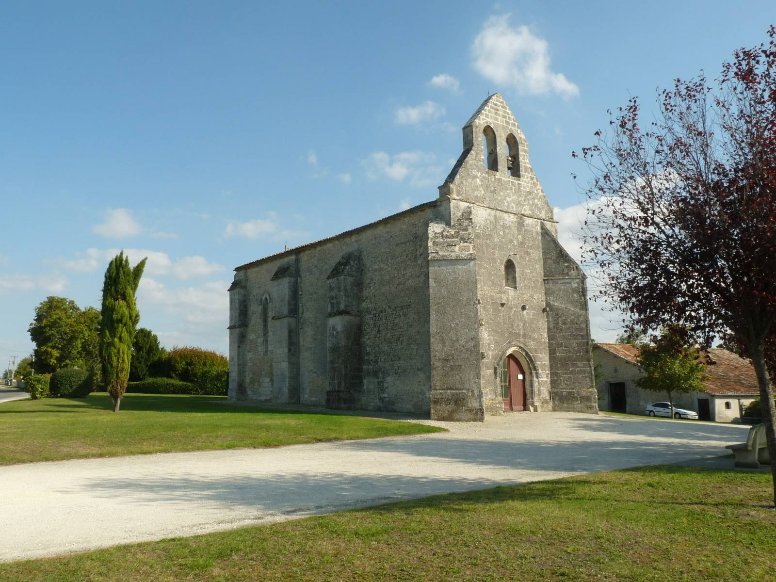 église de St-Médard près Barbezieux (16), France